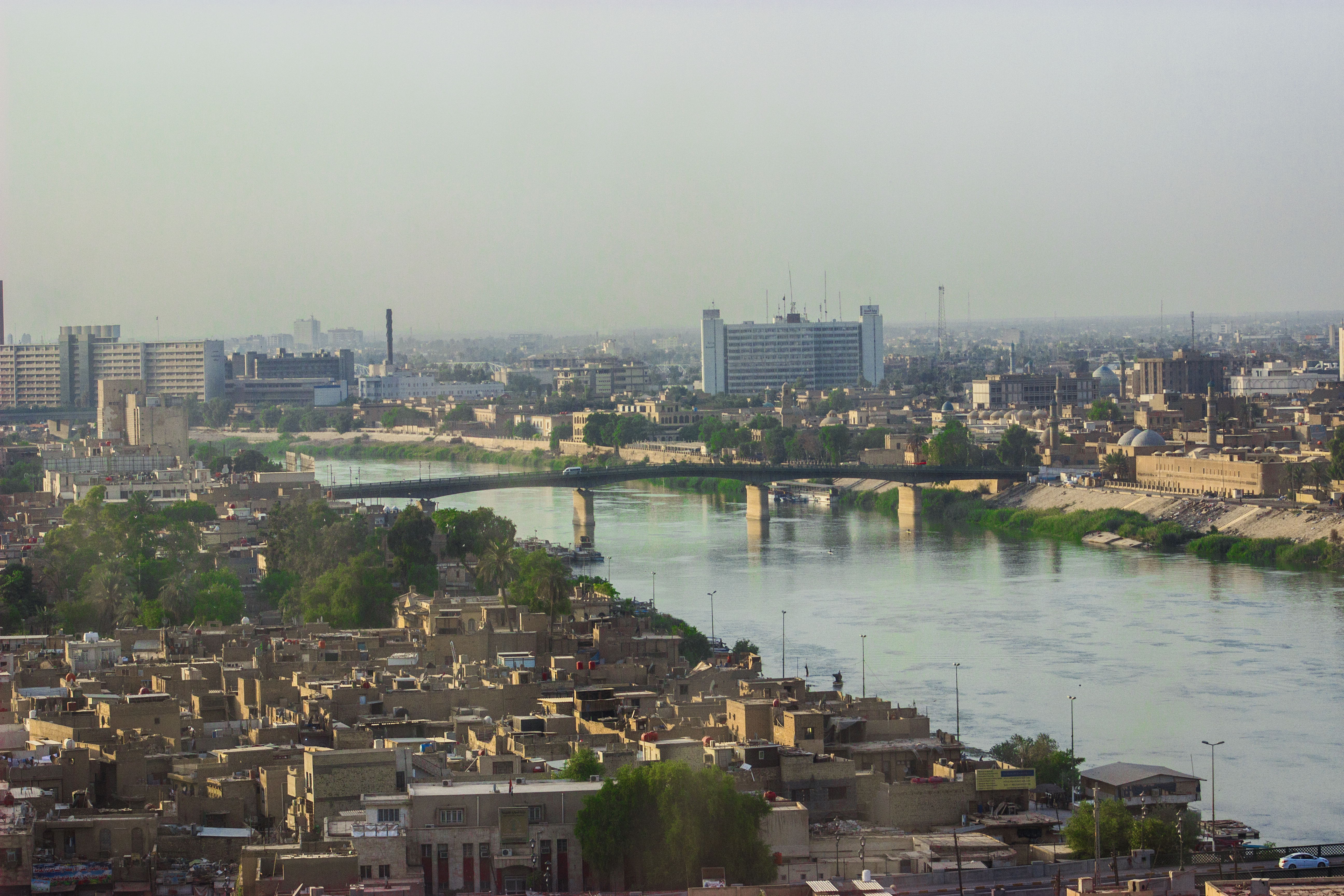 نهر دجلة في وسط بغداد ، عاصمة العراق